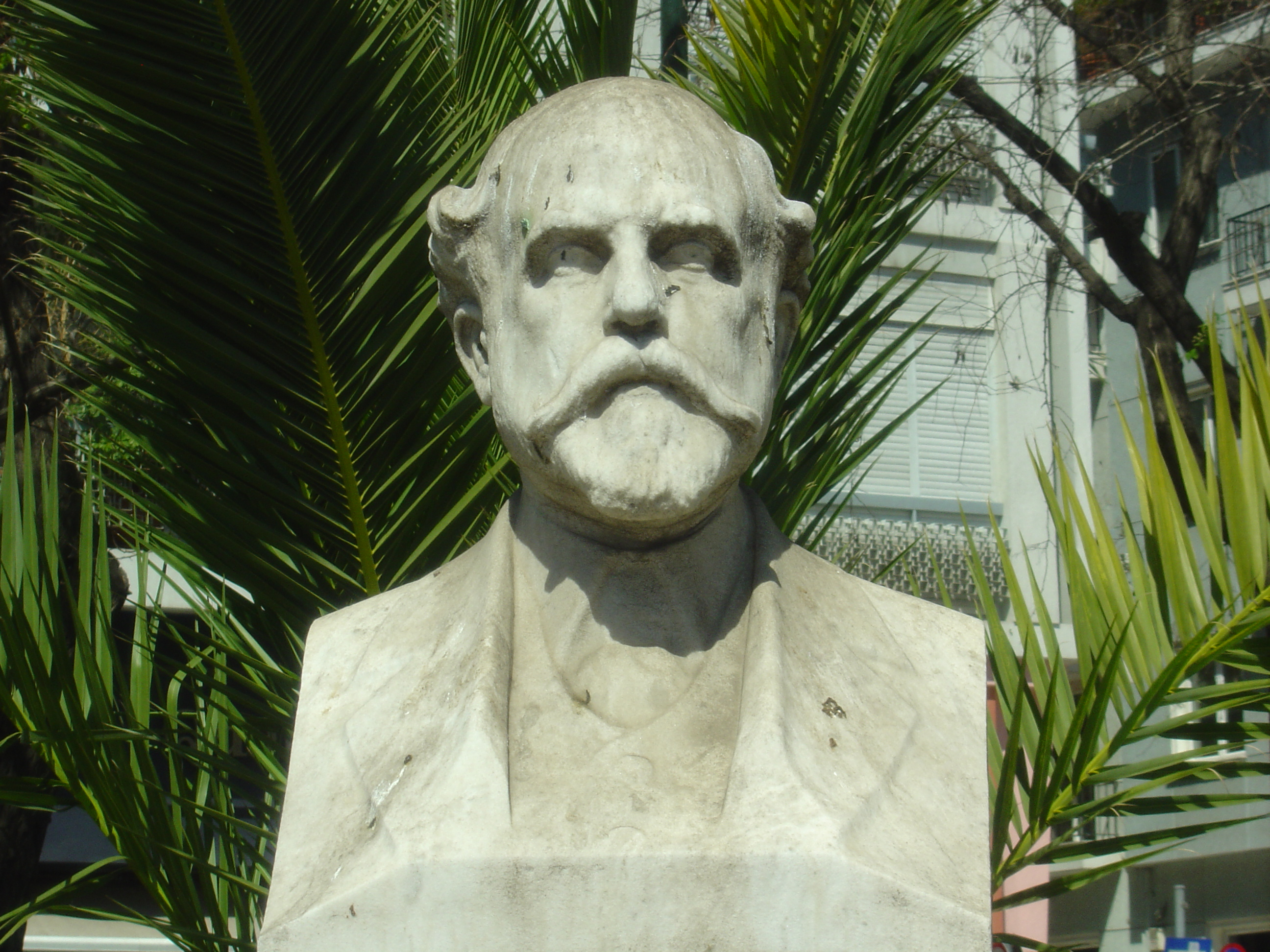 Προτομή του ποιητή Λορέντζου Μαβίλη. Έργο του γλύπτη Πέτρου Ρούμπου, Αθήνα - Πλατεία Μαβίλη.